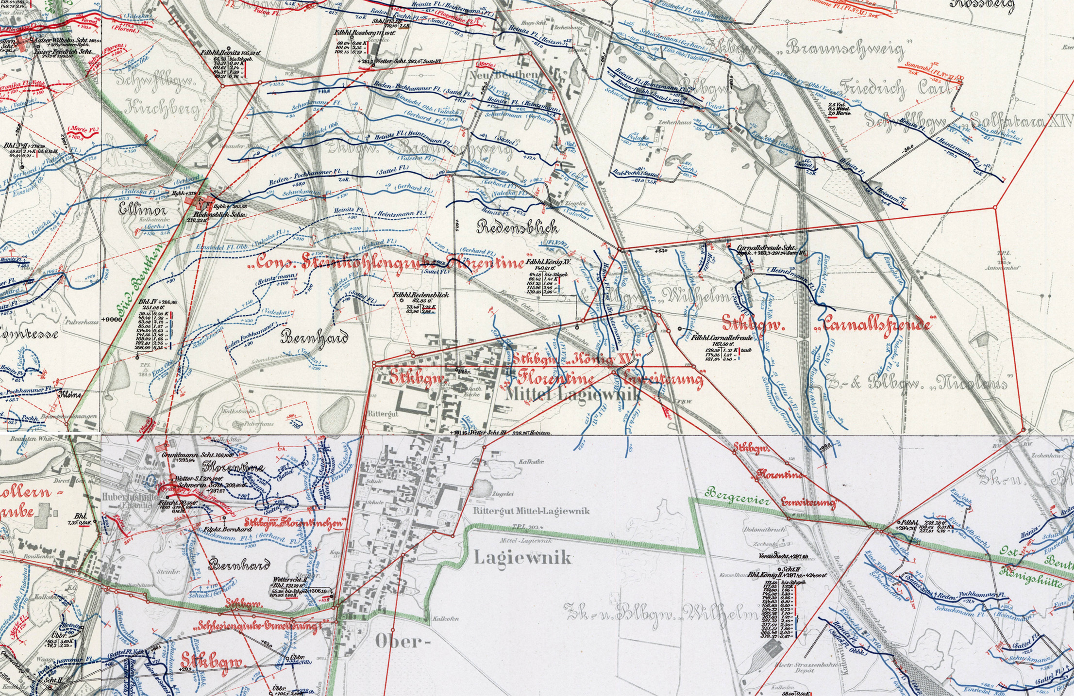 Zusammenschnitt aus den vier Flözkarten Karf, Beuthen, Königshütte und Lipine des Oberbergamtes Breslau von 1901